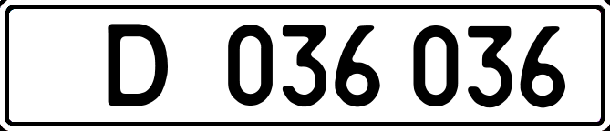 Дипломатический номерной знак Украины, стандарт 2004 года